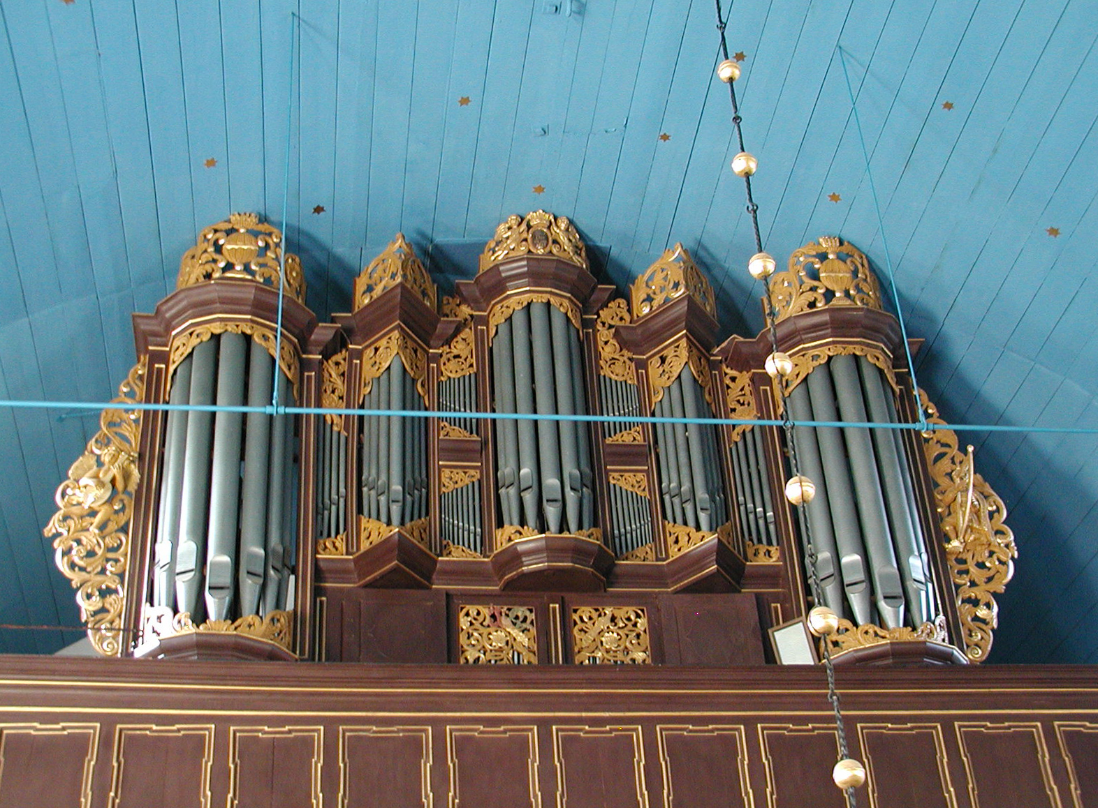 Die Orgel